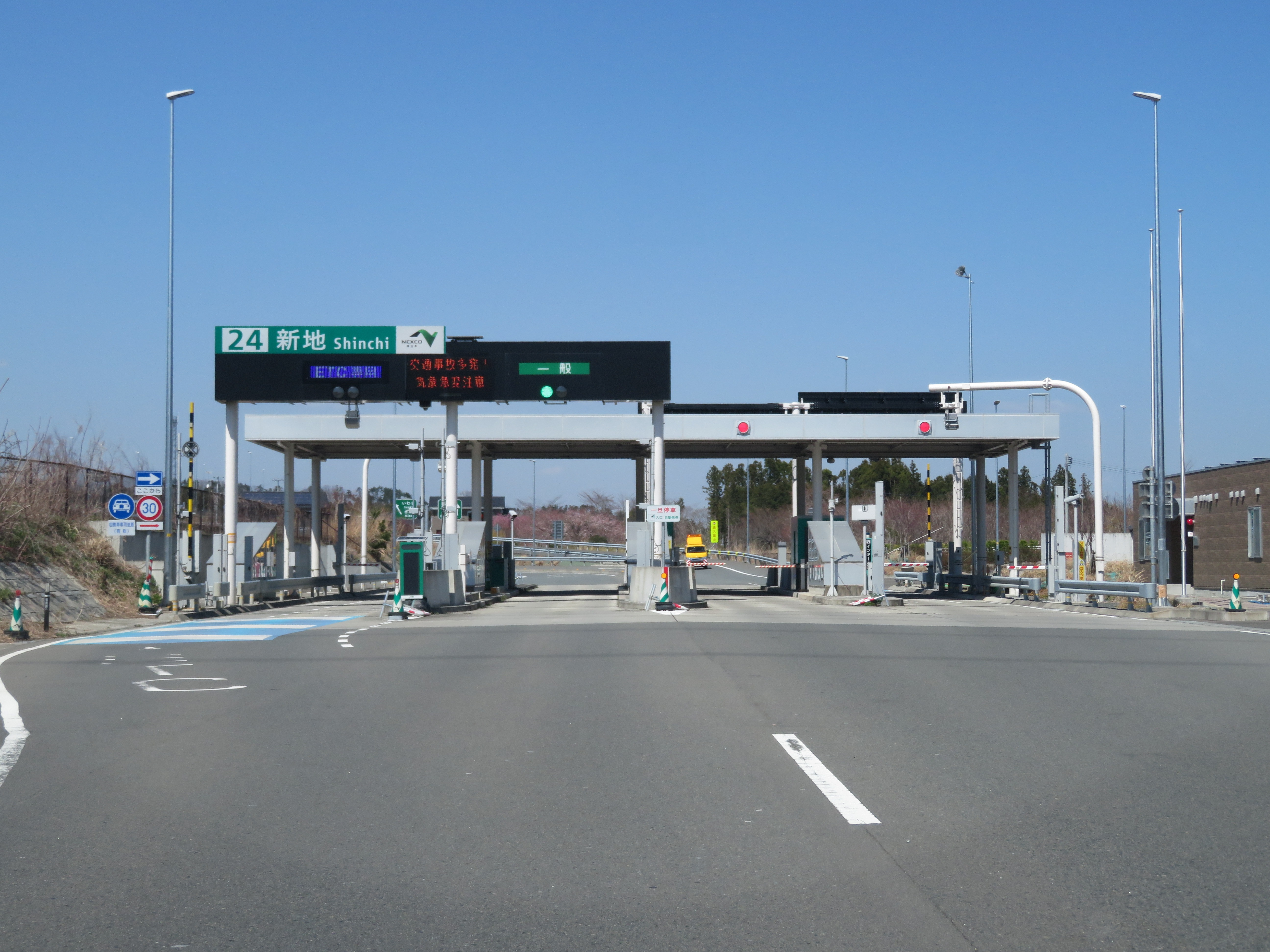 常磐自動車道新地ＩＣ料金所付近 Canon PowerShot SX720 HS